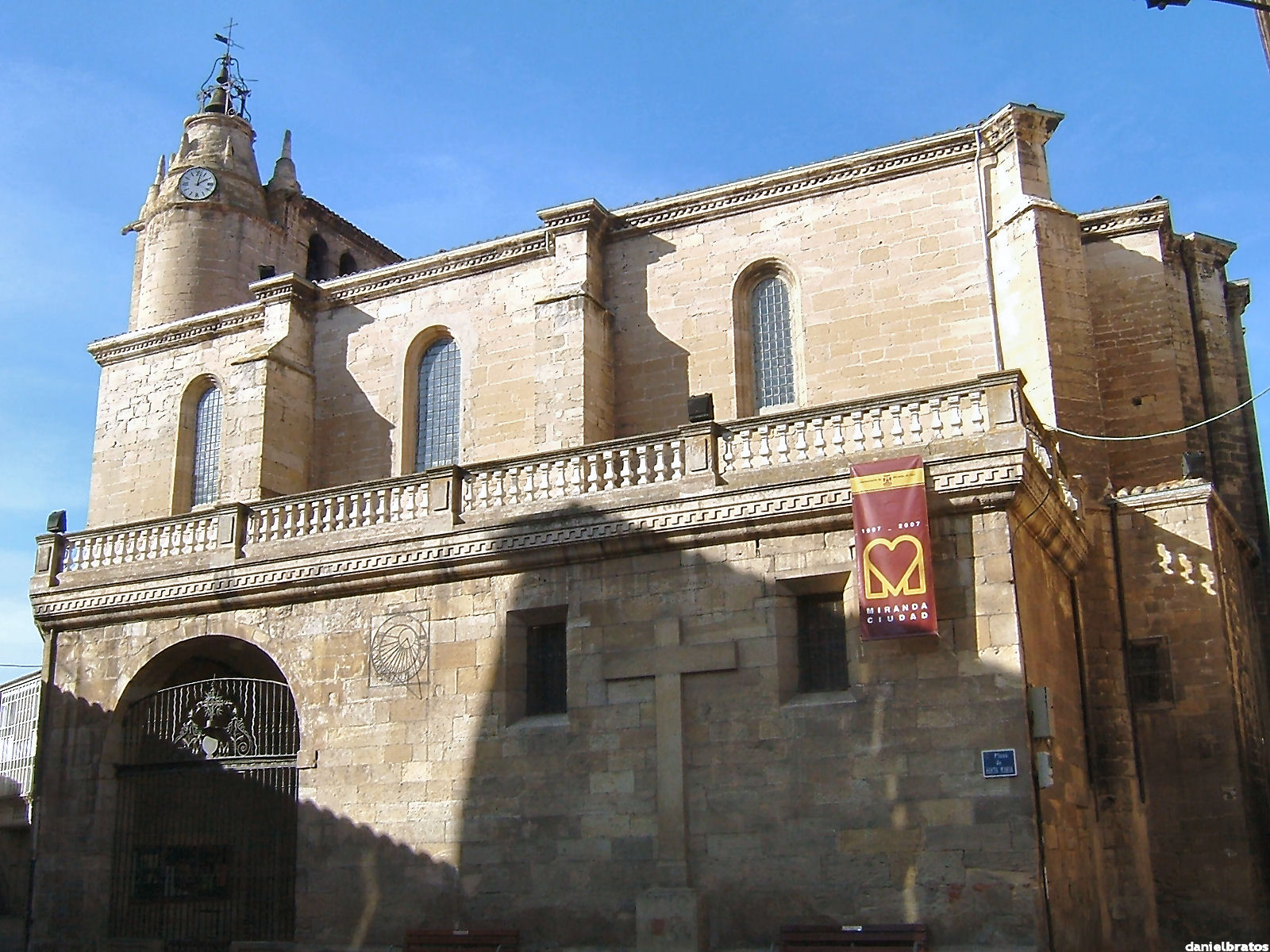 Iglesia de Santa María de Altamira (Miranda de Ebro, España)